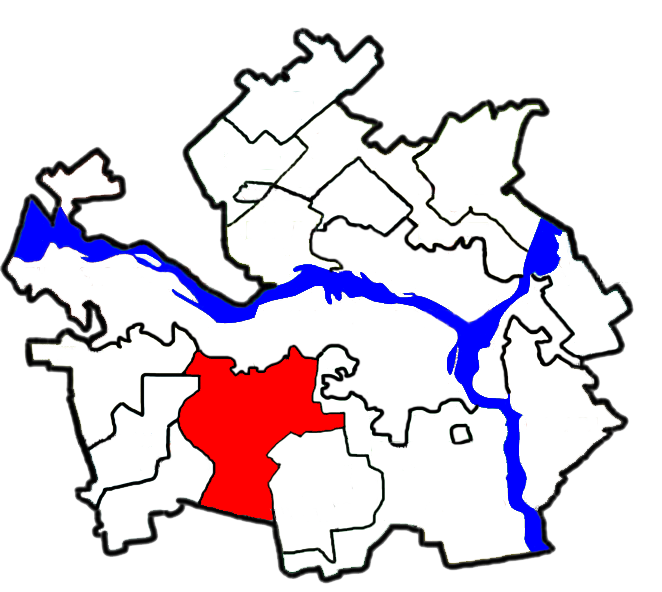 Горьківська сільська рада, Дніпропетровський район